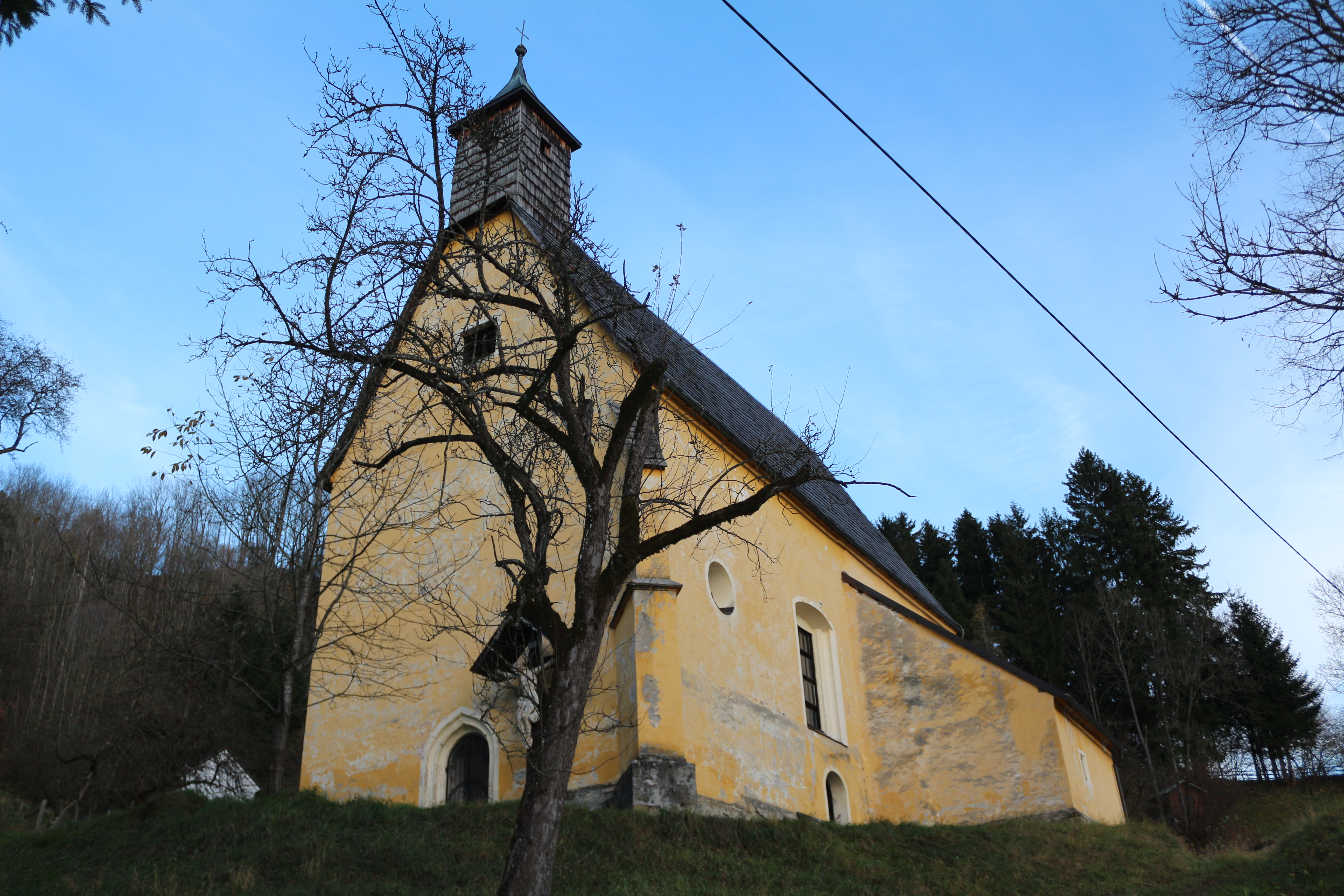 Außenansicht der Filialkirche hl. Virgil in Gaishorn am See